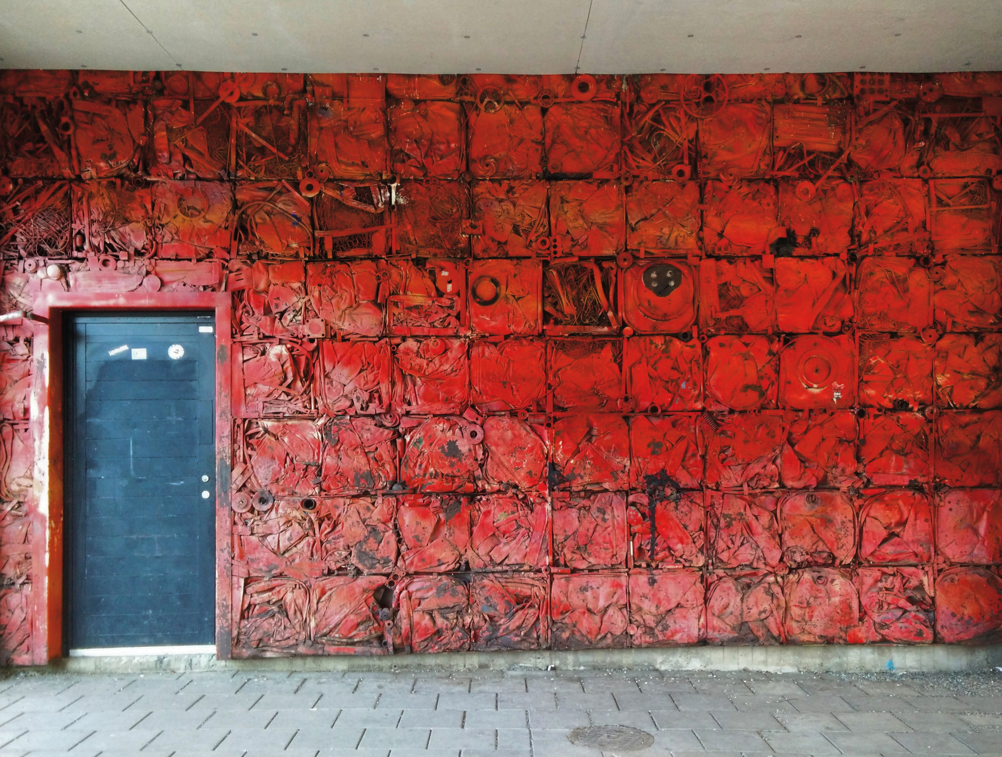 Skolvägg, Söderorts vuxengymnasium. Tidsbild (1973), skulptur i Vårbergsskolan, Sune Fogde tillsammans med Lizzie Olsson Arle